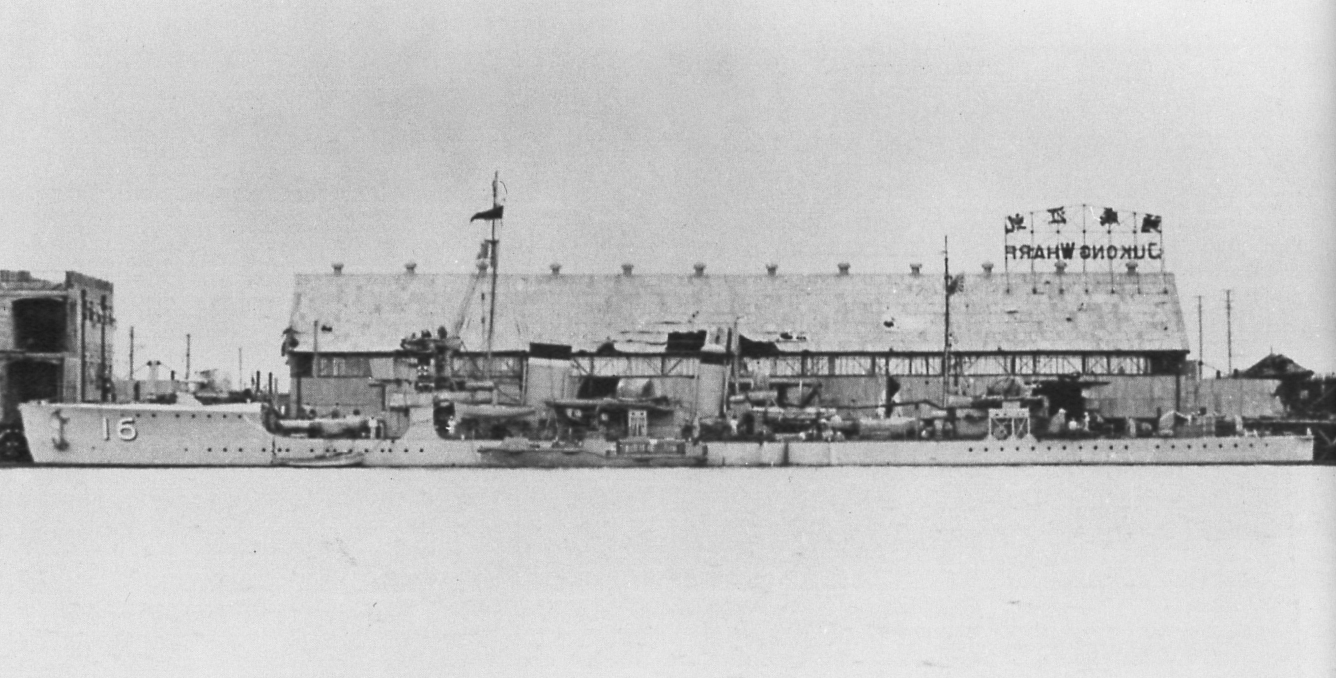 上海に停泊中の第16駆逐隊所属艦。昭和12年に英国海軍が撮影したもので、後部煙突付近に設けられた炊事用煙突の高さから「朝顔」と思われる。軍艦旗を翻していることから日華事変勃発直後の撮影と推定される。